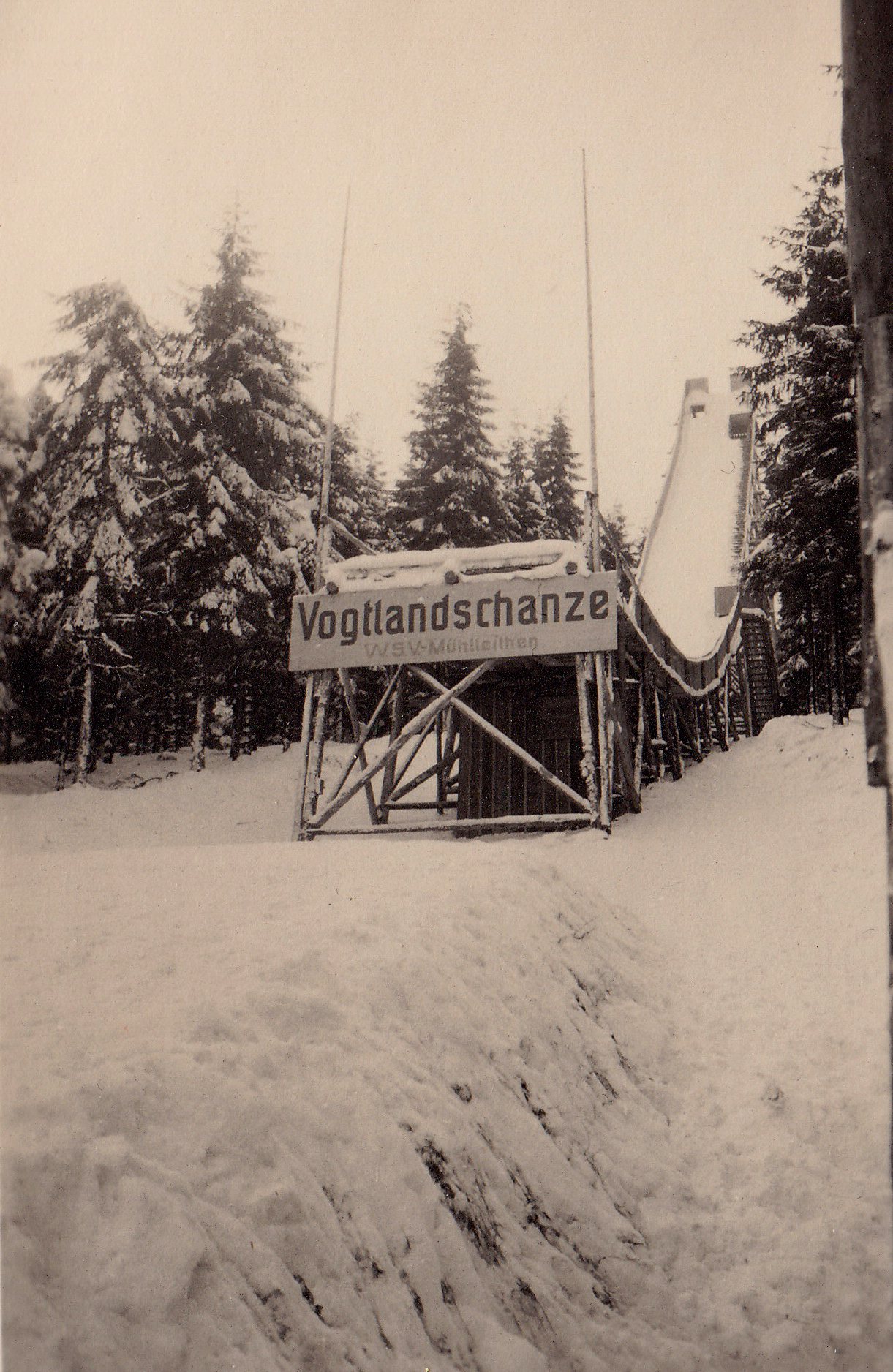 Die Vogtlandschanze des WSV-Mühlleiten im Winter der Eröffnung 1933